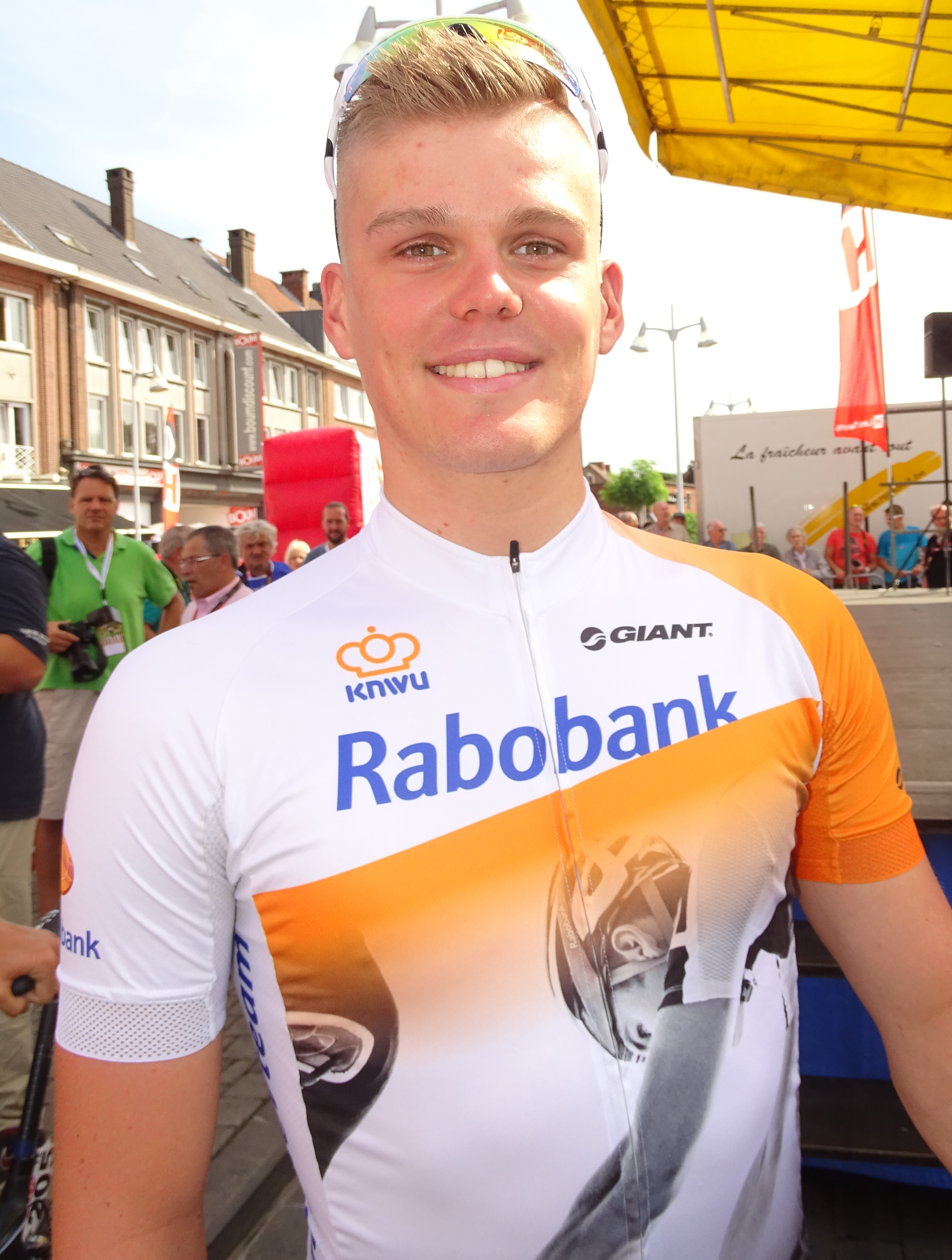 Reportage réalisé le mercredi 22 juillet à l'occasion du départ du Grand Prix Pino Cerami 2015 à Saint-Ghislain, Belgique.